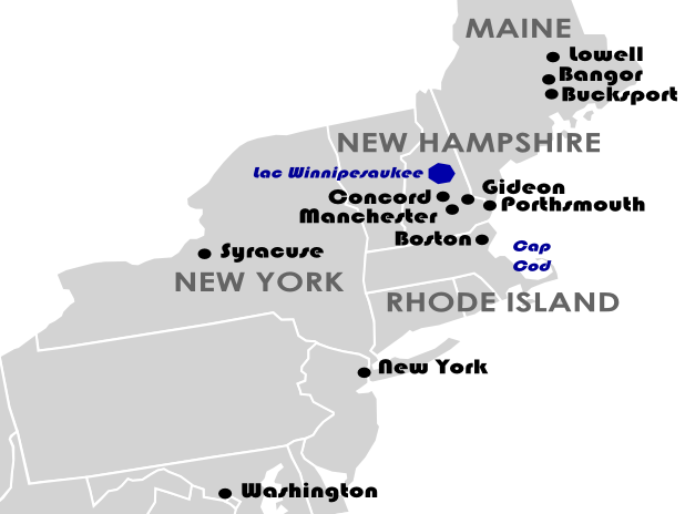 Principaux lieux mentionnés dans Cornes